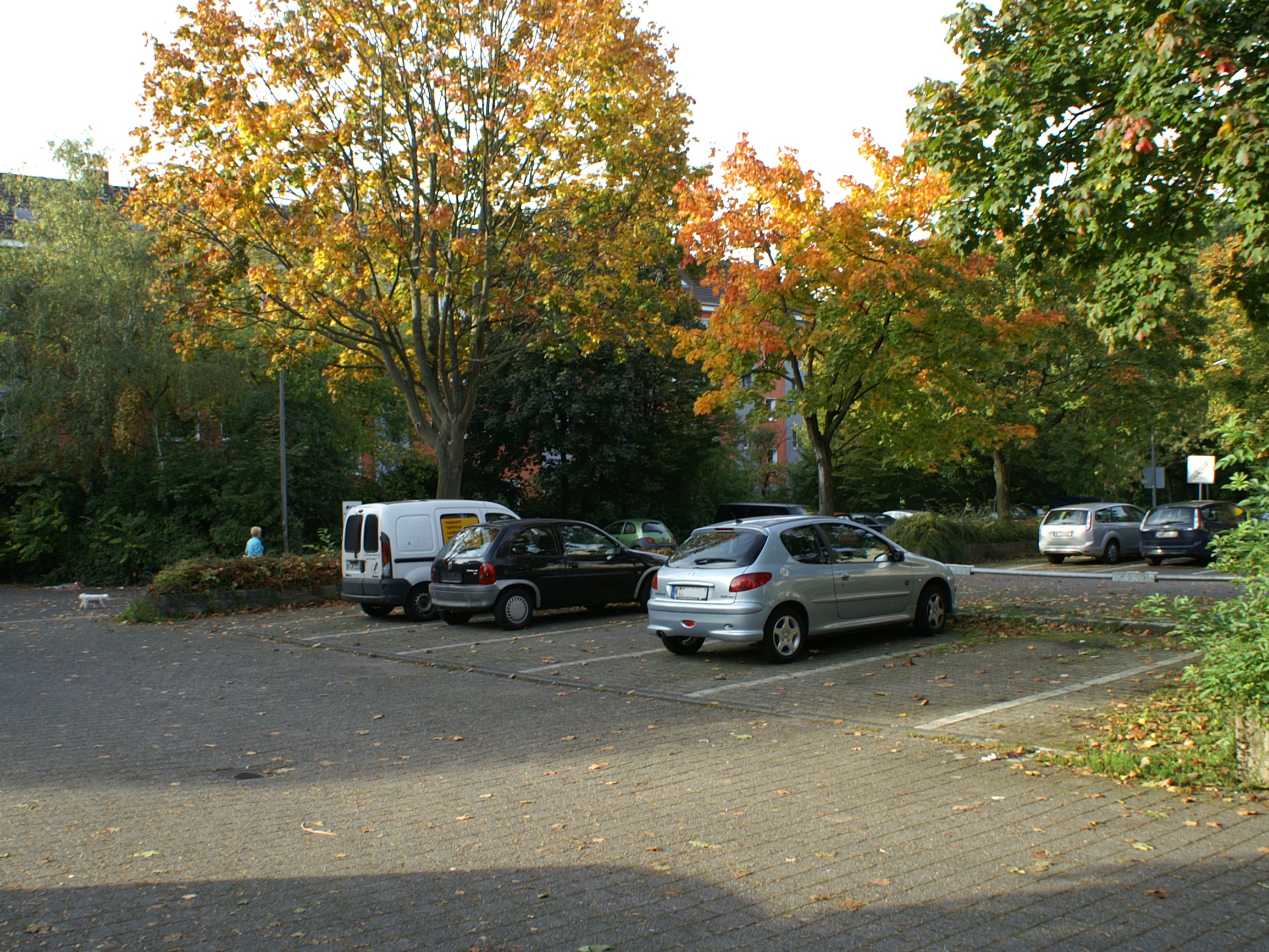 Parkplatz Gremberger Str./Flammersfelder Str. in Köln-Humboldt/Gremberg. Dort wurde der Polizist Walter Pauli während eines Einsatzes am 9. Mai 1975 von dem Terroristen Werner Sauber ermordet.